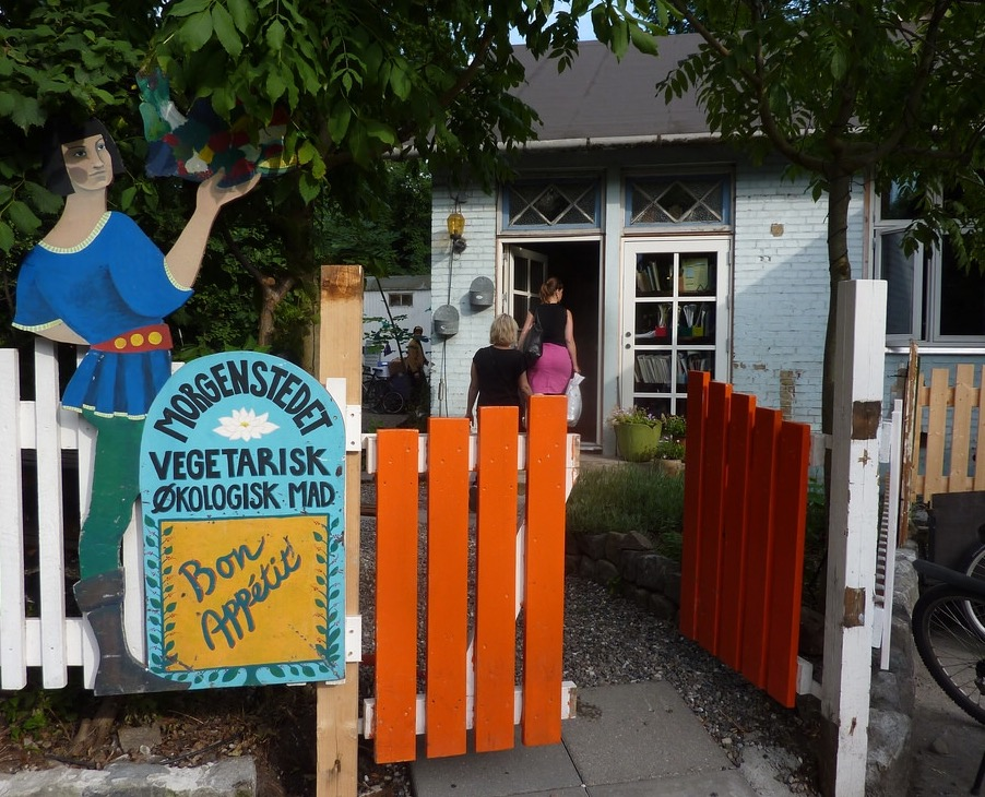 Restaurant Morgenstedet på Christiania i juni 2014.